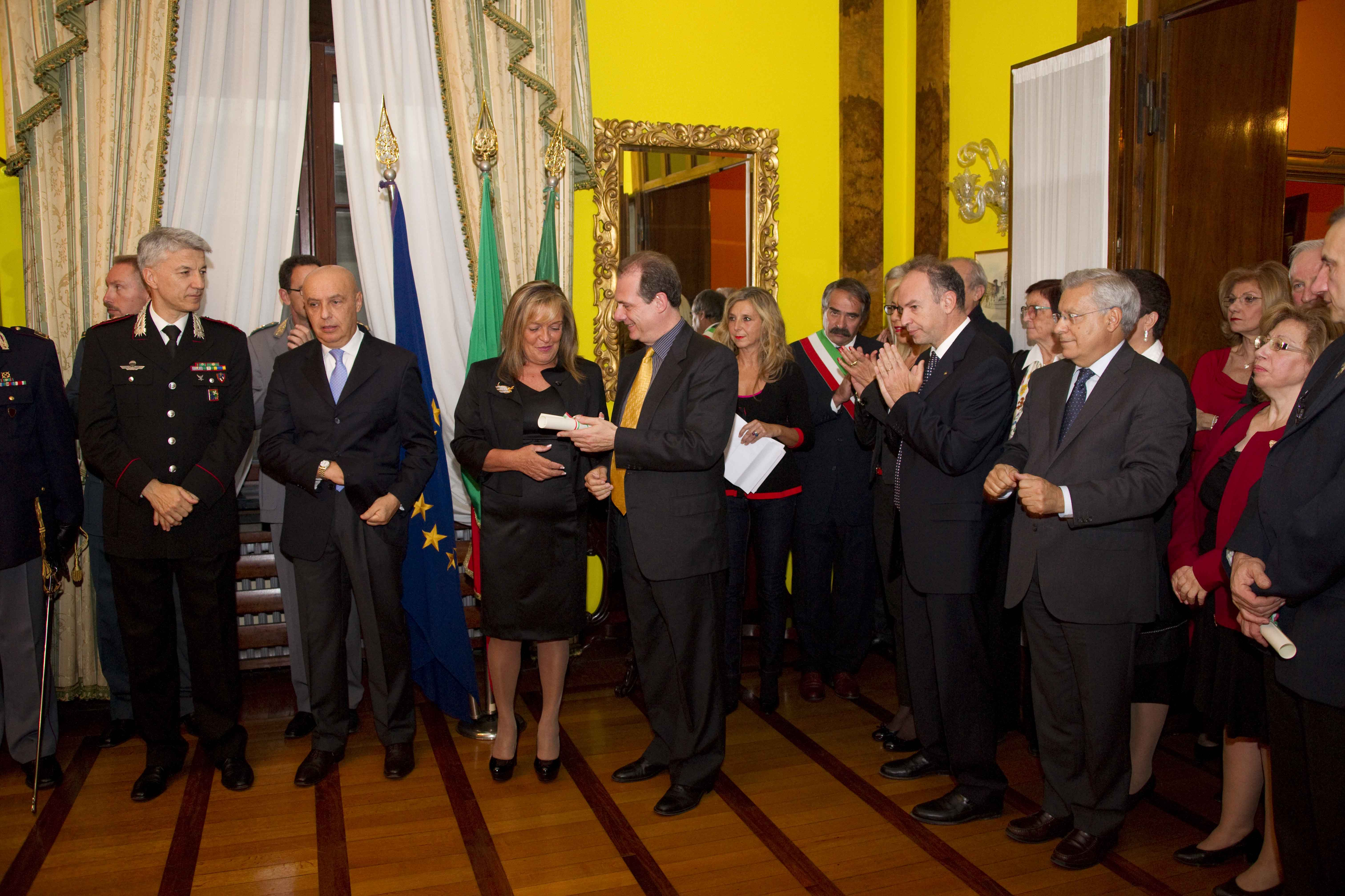 ceremonia para honrar a Grondona "cavaliere"